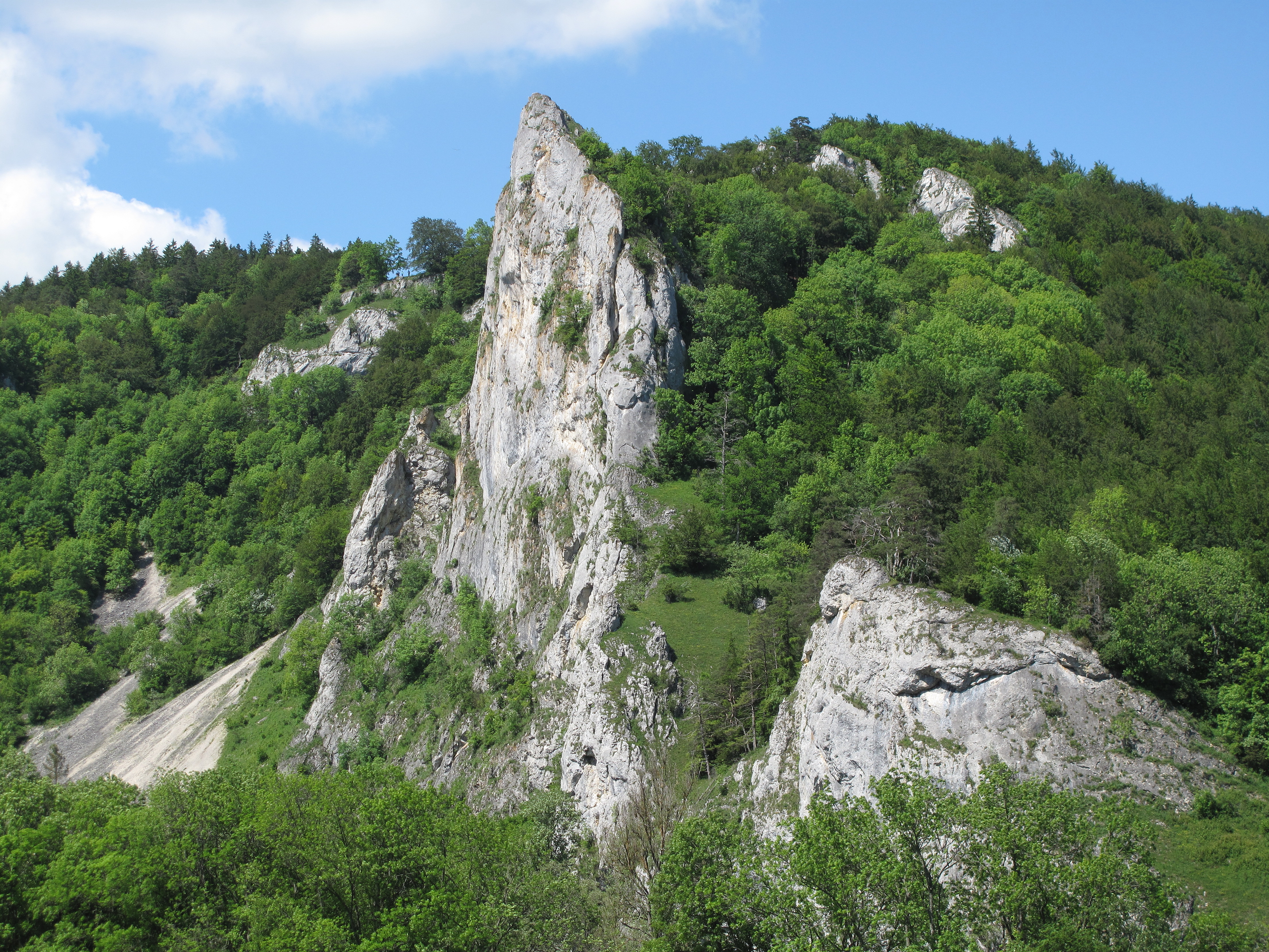 Burgfels der Ruine Stiegelesfels.